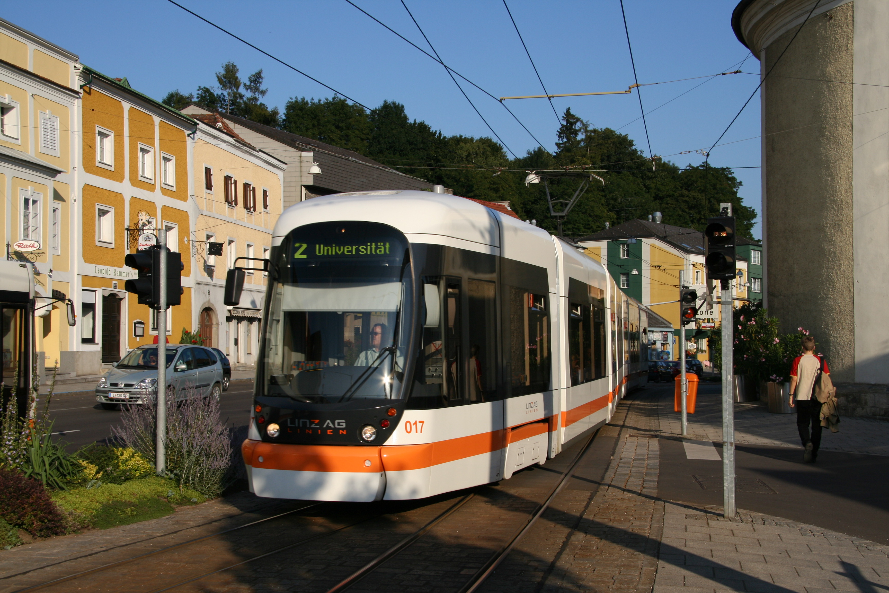 Cityrunner 017 in Linz Ebelsber.